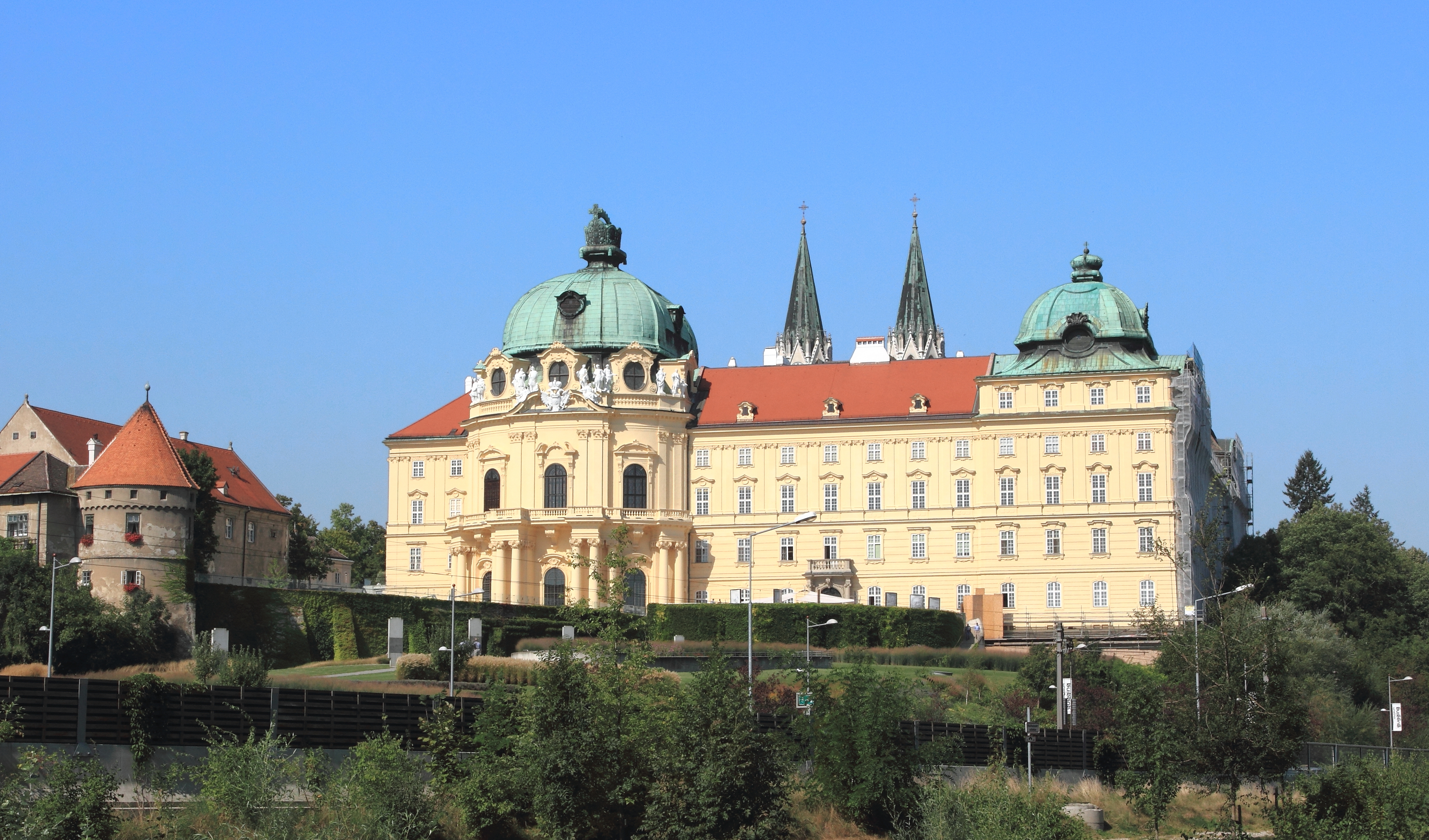 Südostansicht des Stiftes Klosterneuburg.